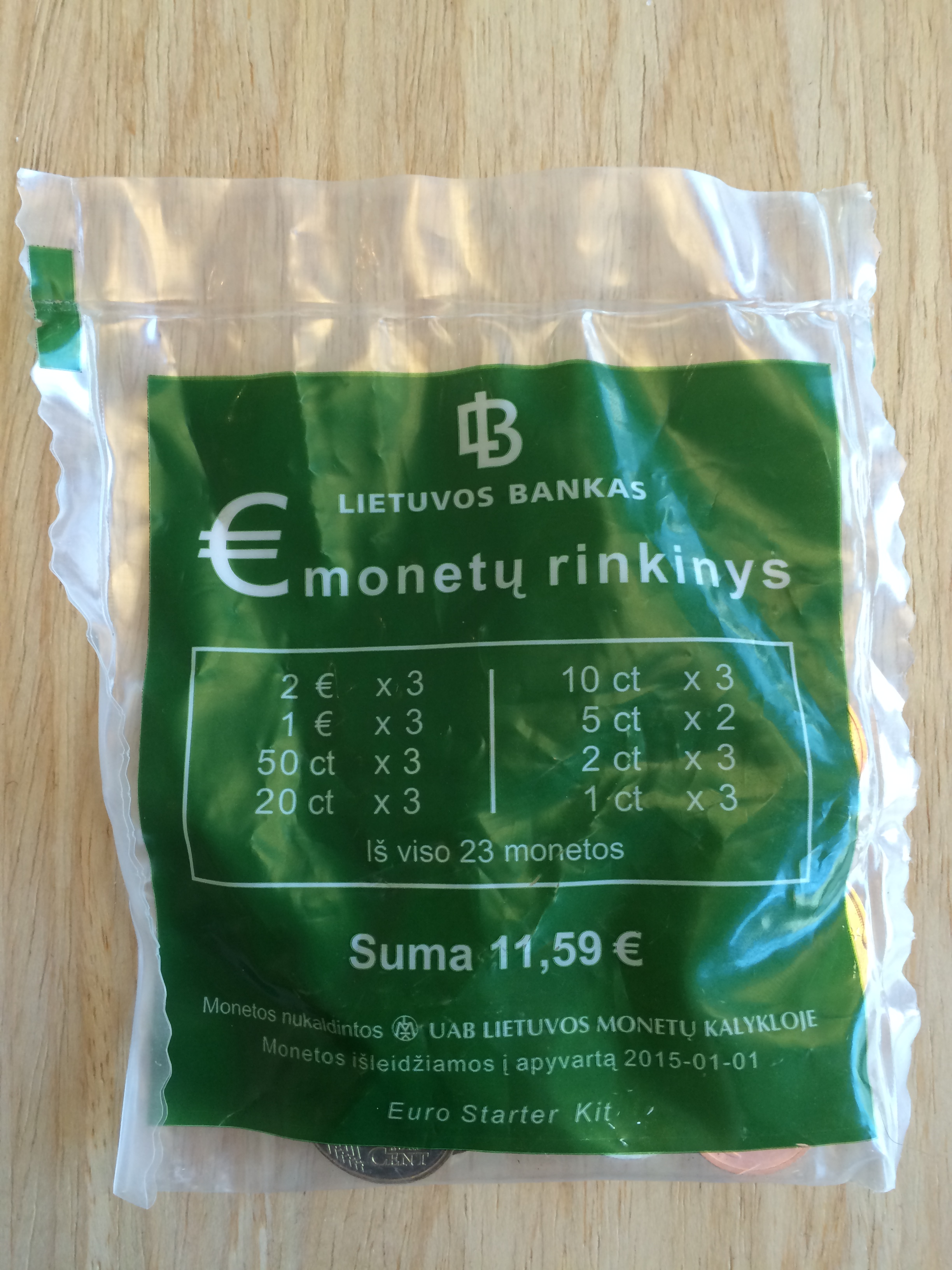 Lithuanian euro starter kit